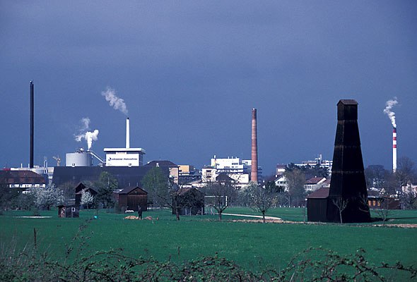 Das Industriegebiet Schweizerhalle von Pratteln und Muttenz. Vor dem Gebiet sind alte Salzbohrtürme zu erkennen.